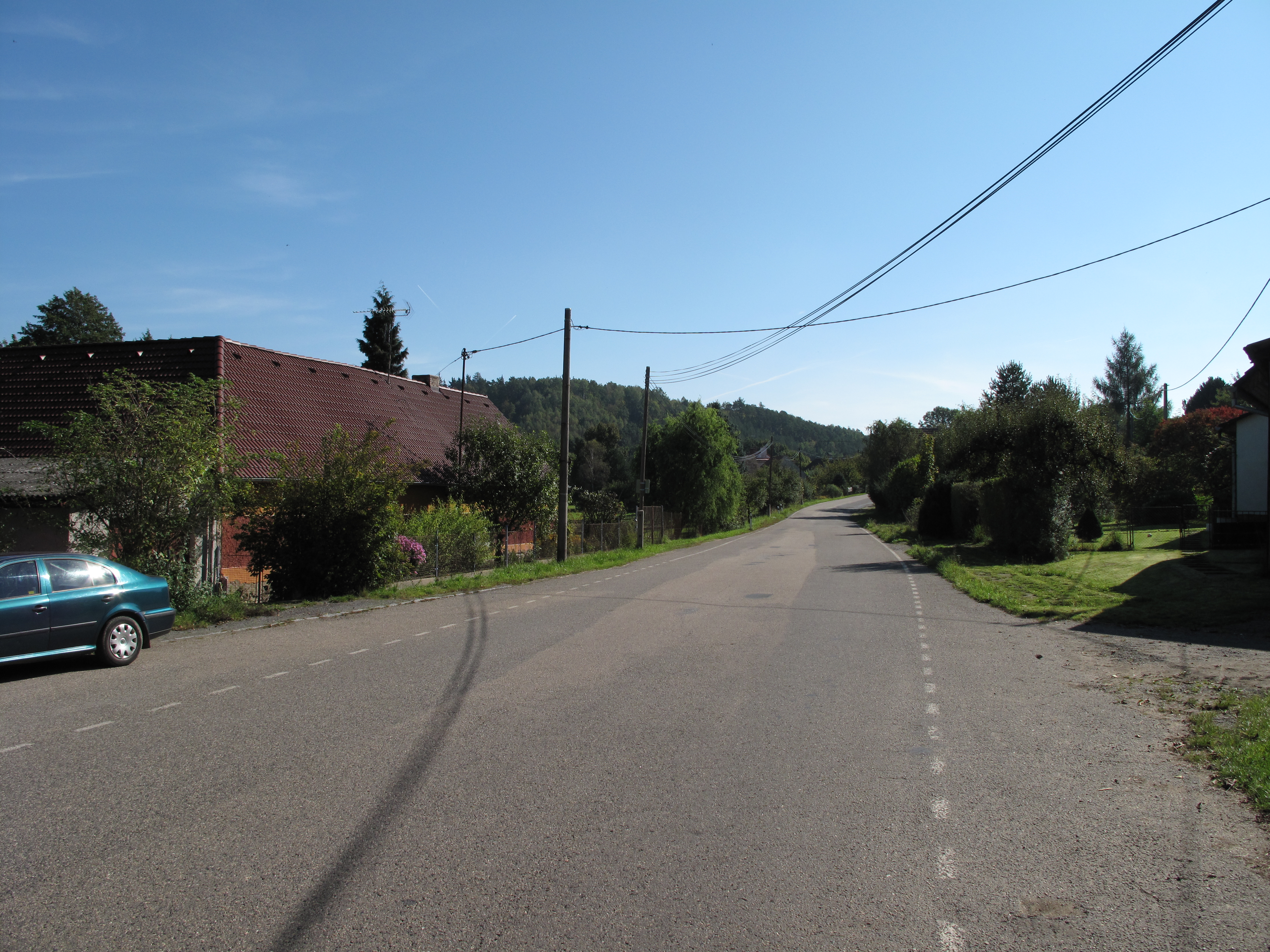 Hlavní silnice v Borovce. Okres Benešov, Česká republika.